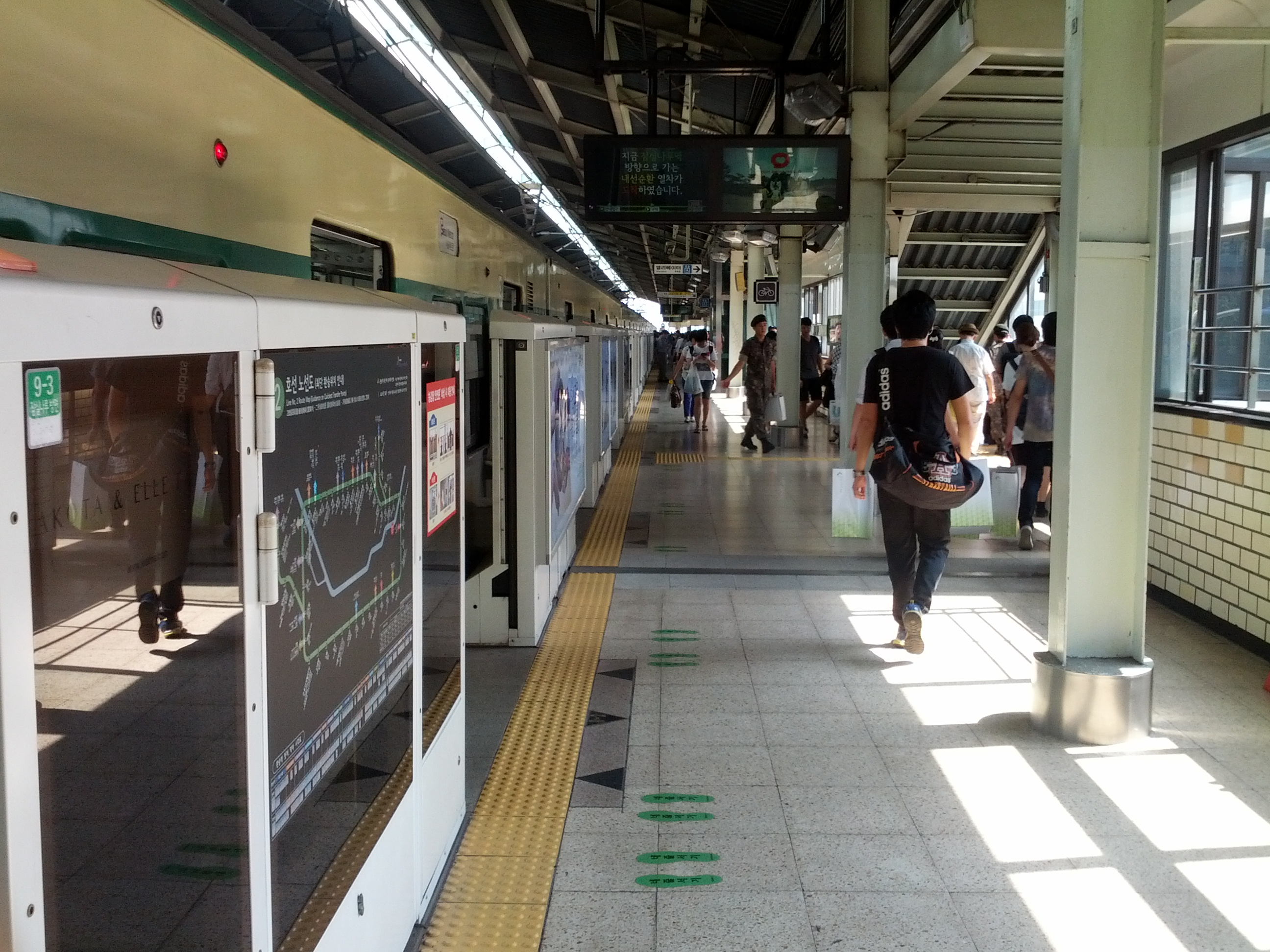 강변역 승강장